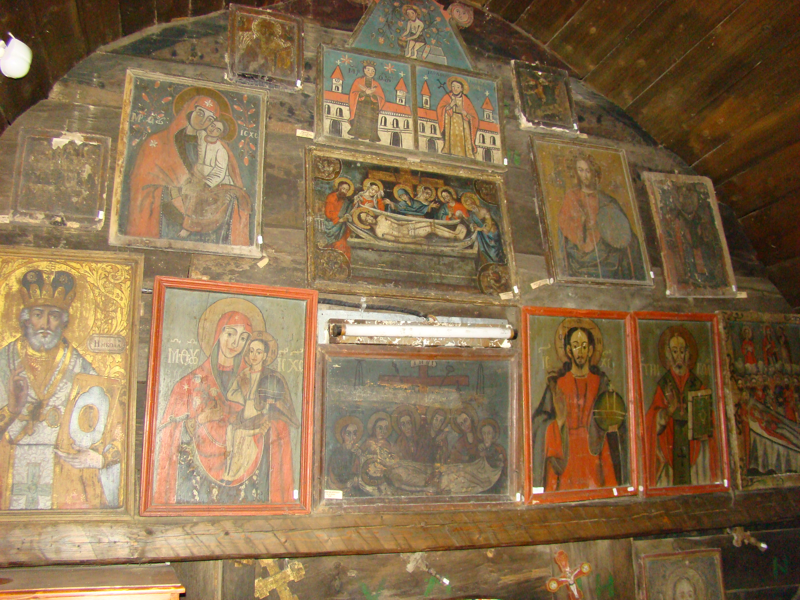 Biserica de lemn din Tinca, județul Bihor